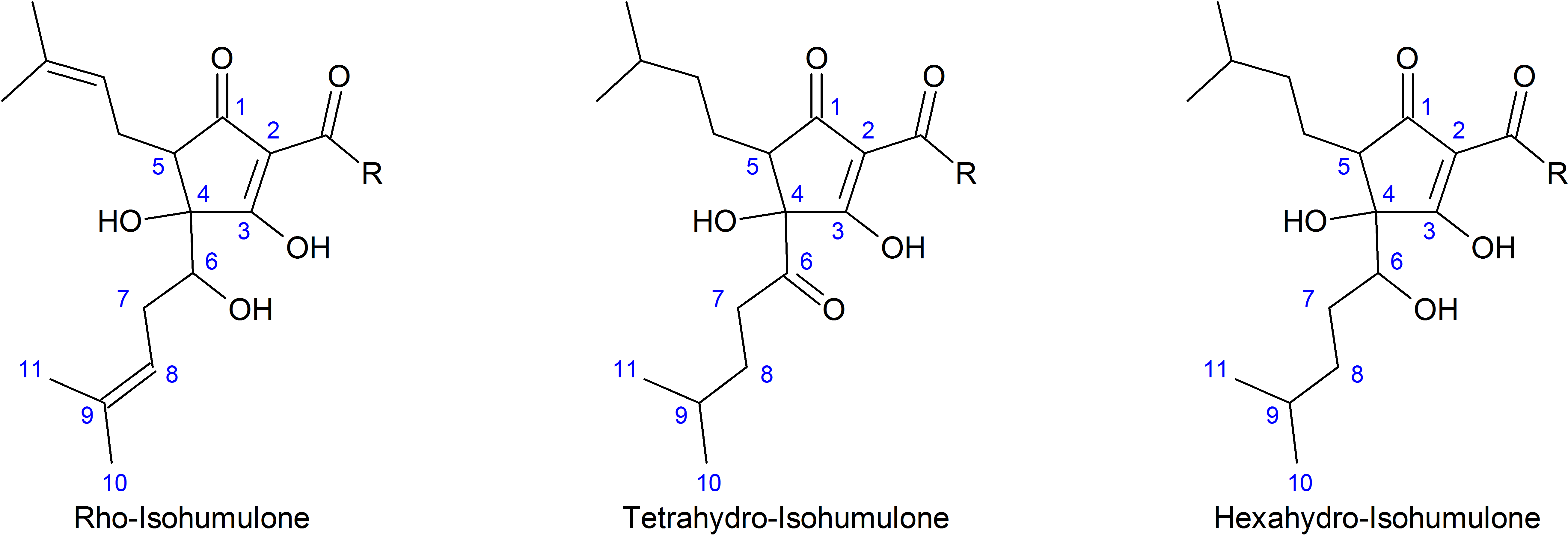 Struktuturformel einiger reduzierter Isohumulone